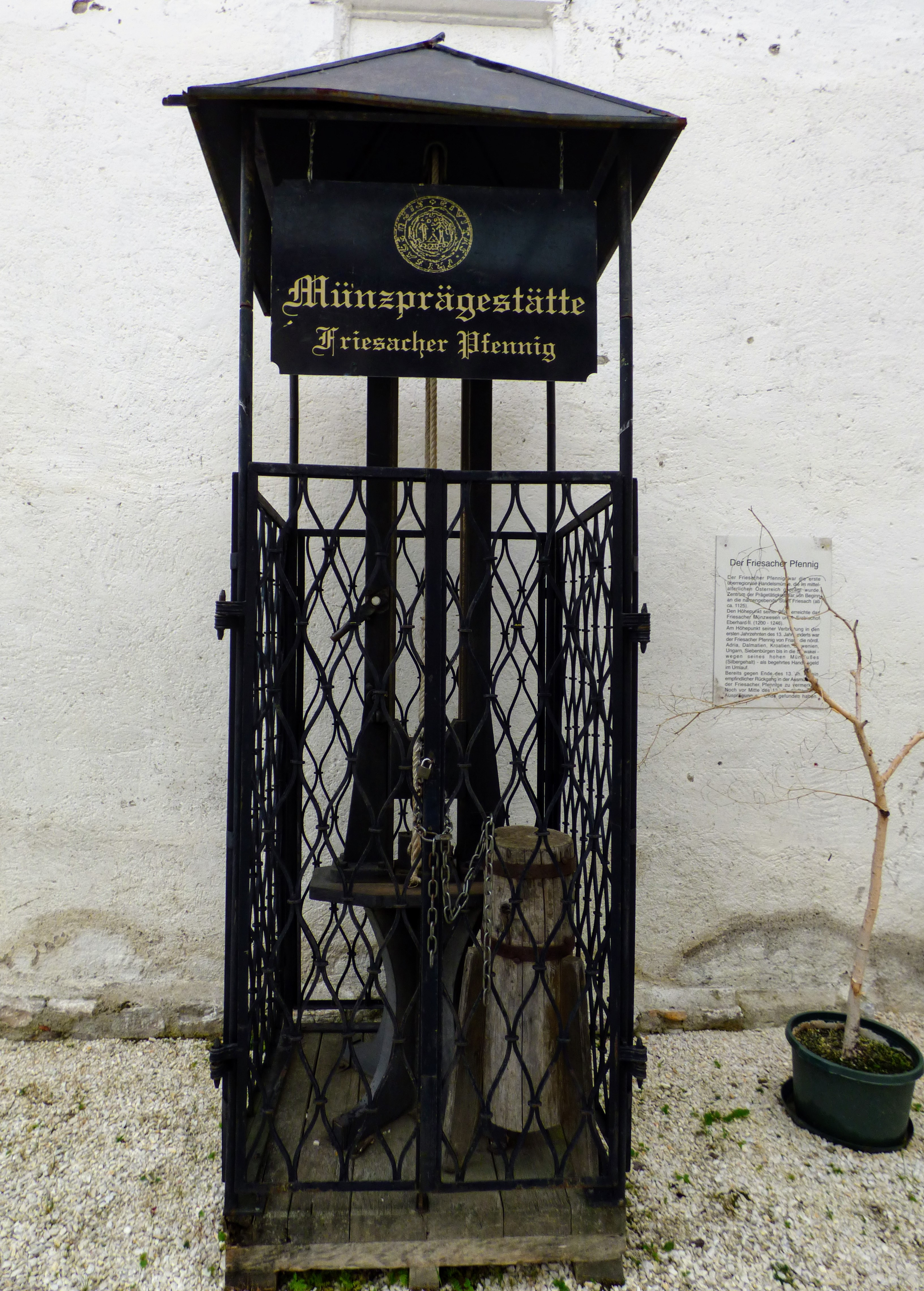 Tag des Denkmals 2019: Friesach – Altstadtspaziergang. Fürstenhof mit Münzprägestätte Dieses Bild wurde anlässlich des österreichischen Tags des Denkmals 2019 in Kärnten eingereicht. Diese Datei wurde im Rahmen von WikiDaheim 2019 in Österreich erstellt und hochgeladen.Sie wurde dem Themenbereich Denkmalschutz zugeordnet.